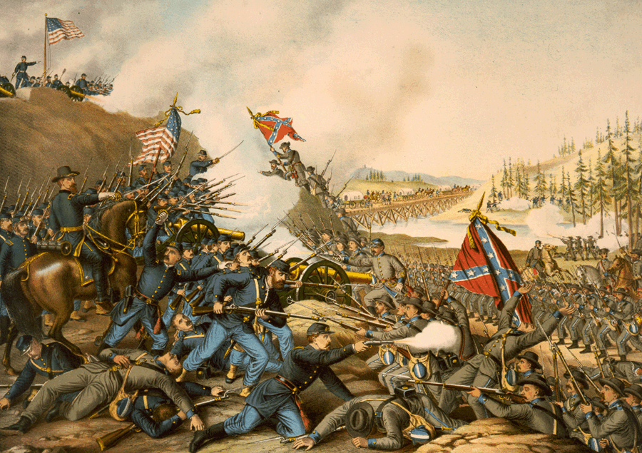 TITLE: Battaglia di Franklin. 30 novembre 1864 - Unione (Gen. Schofield) ... Confederati (Gen. Hood) ...CREATED/PUBLISHED: Chicago : Kurz & Allison, Art Publishers, 1891.